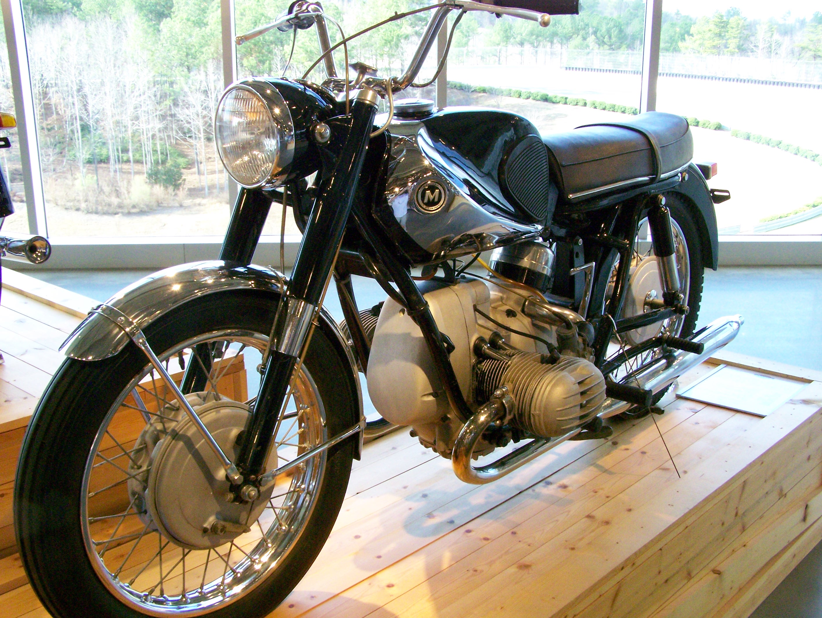 Barber Vintage Museum_434 Marusho Lilac